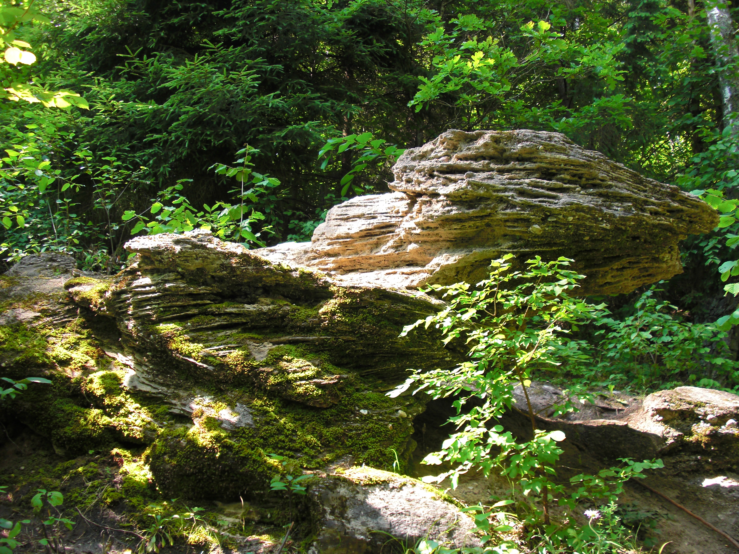 Ausiutiškių konglomeratas